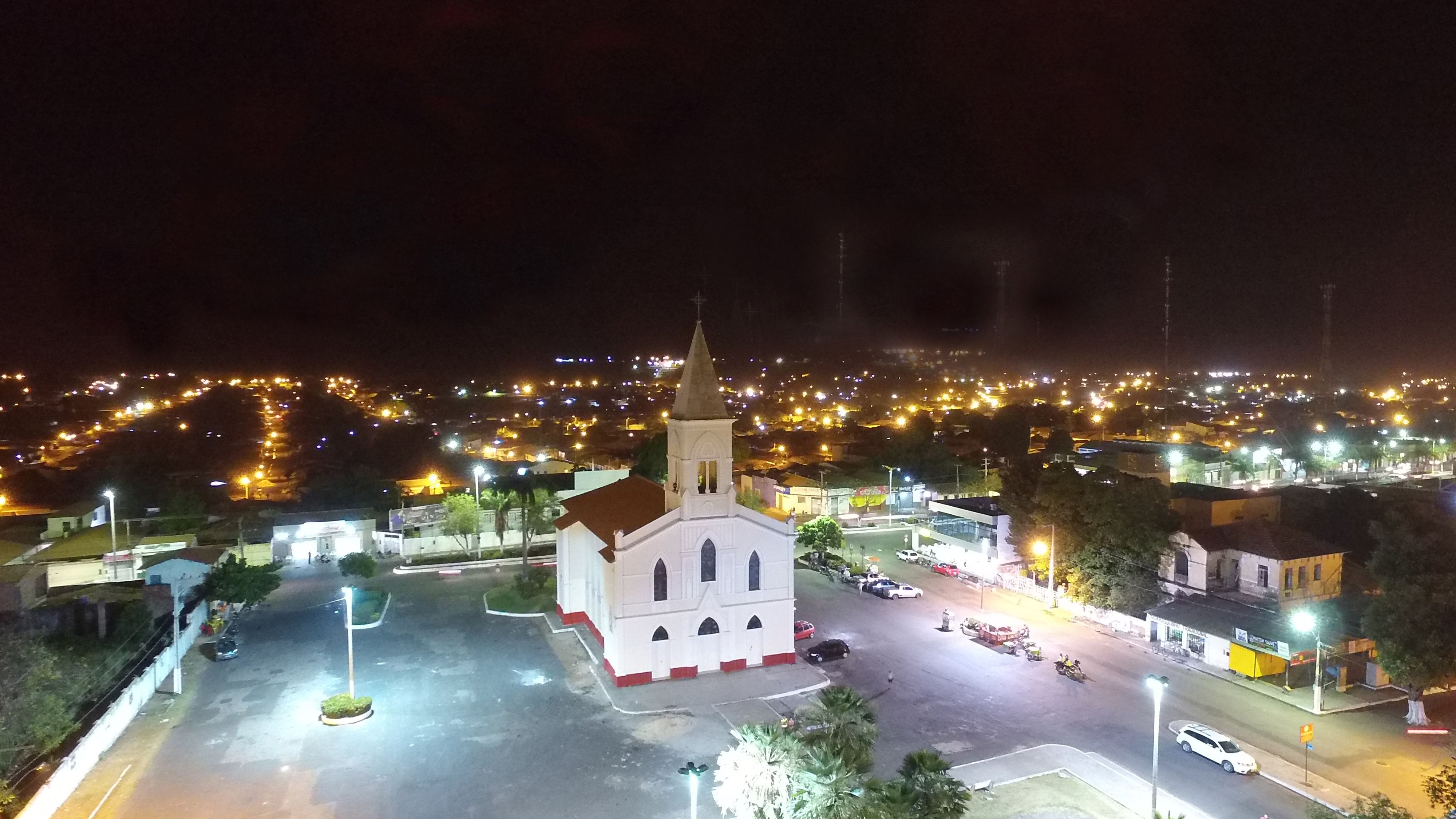 Português do Brasil: Vista área da Igreja de São Sebastião.